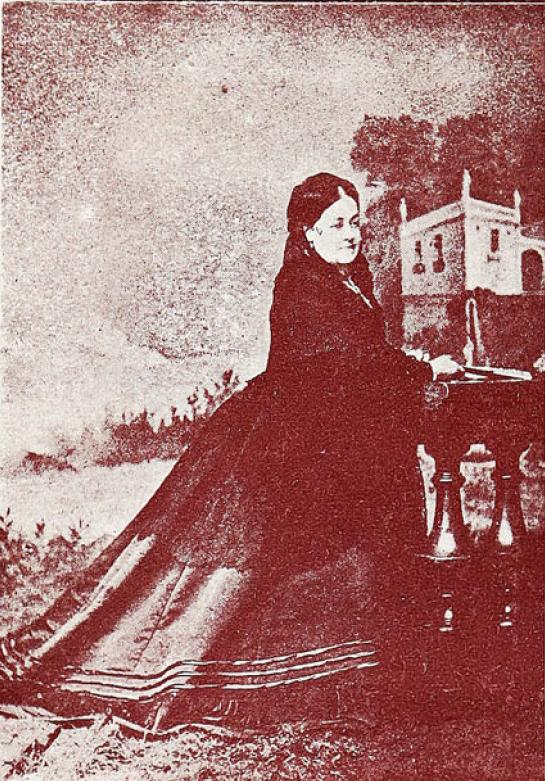 Tránsito Flores de la Cavareda (Santiago, 1820 - ibídem, 29 de agosto de 1890) fue la primera dama de Chile entre 1861 y 1871, al ser la esposa del presidente José Joaquín Pérez Mascayano.